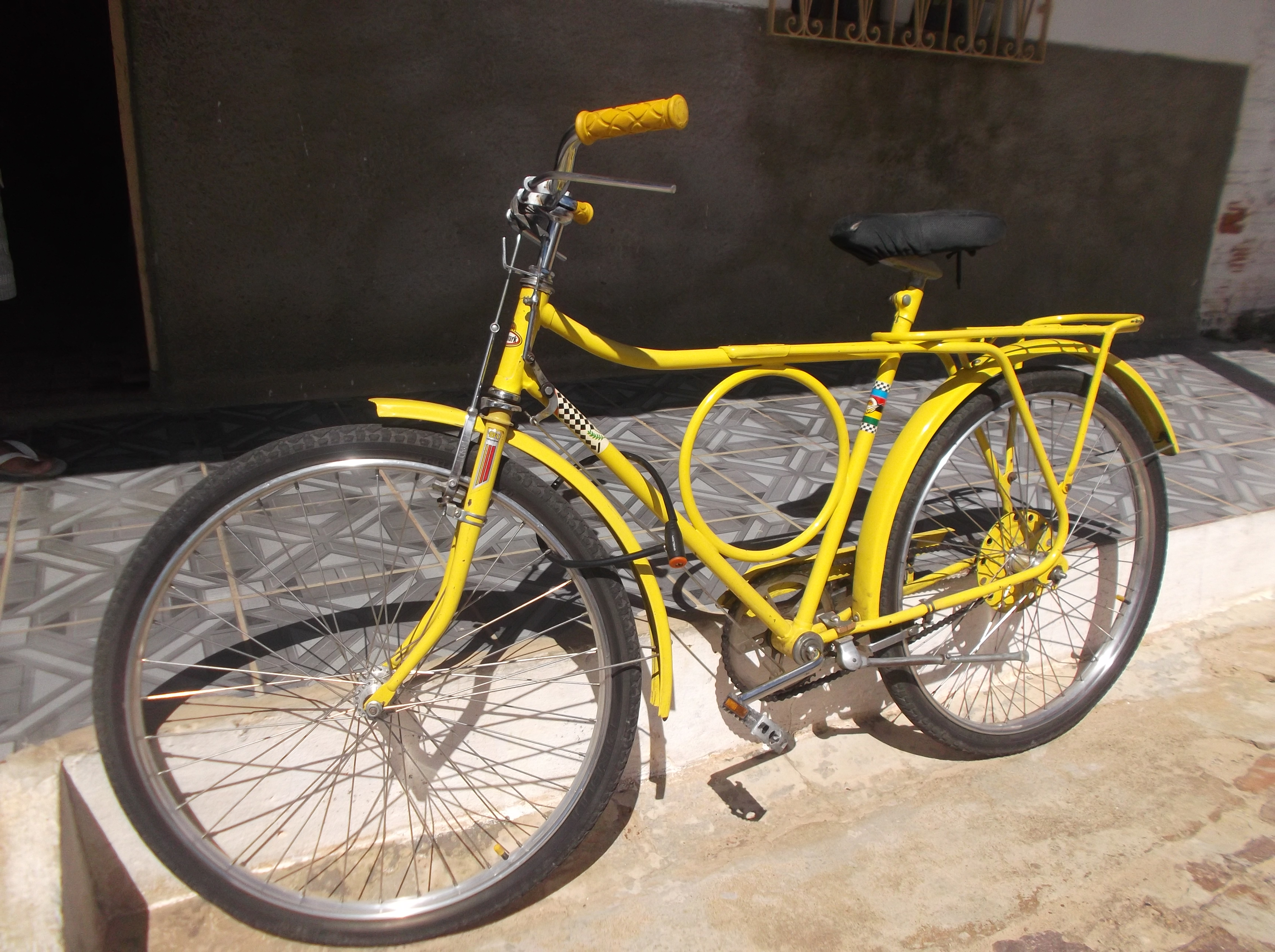 Bicicleta brasileira, marca monark barra circular, ano de 1981.